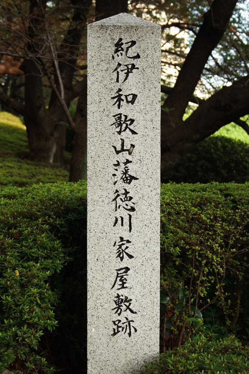 紀伊和歌山藩徳川家屋敷跡のja:石碑 写真 Hadge撮影 2006年08月17日 東京 Category:史跡の画像 Category:石碑画像 Category:千代田区の画像